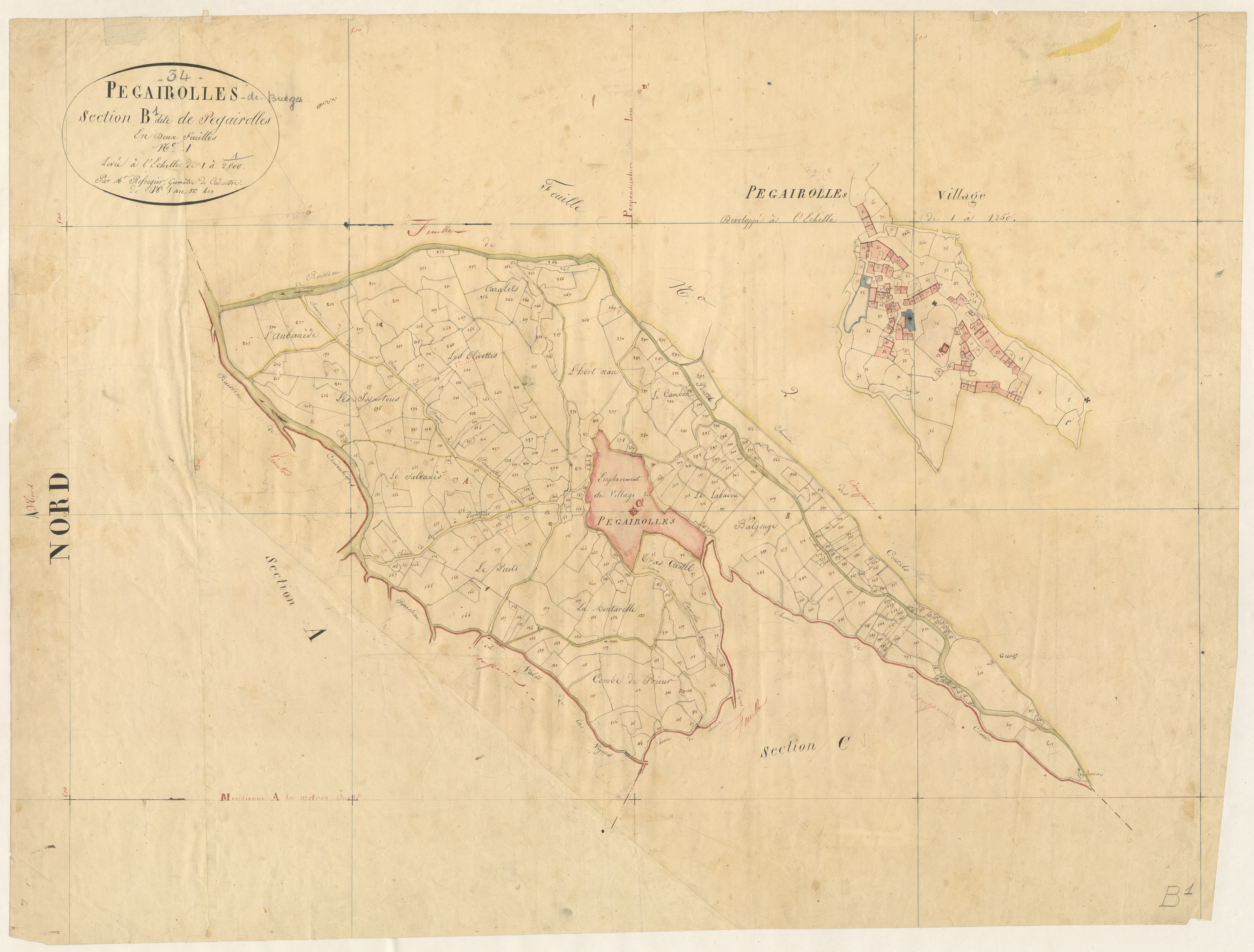 Pégairolles-de-Buèges. - Cadastre napoléonien : section B1 de Pégairolles.